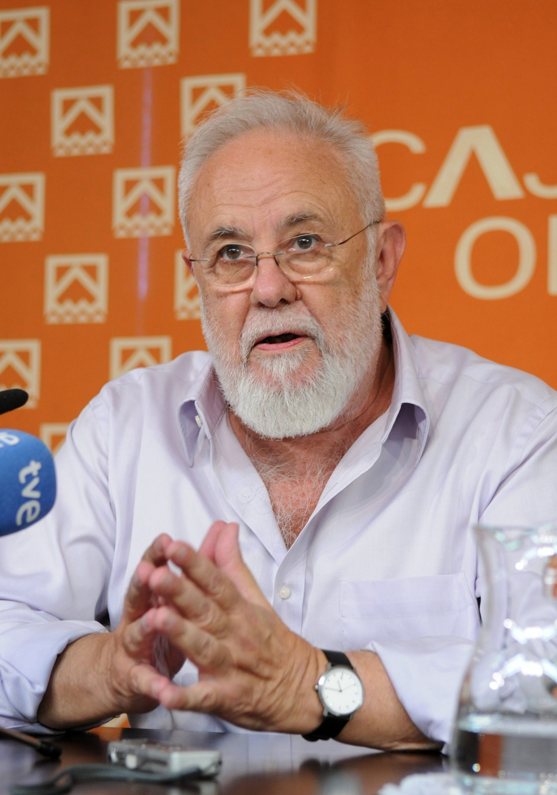 El director y escritor Gonzalo Suárez